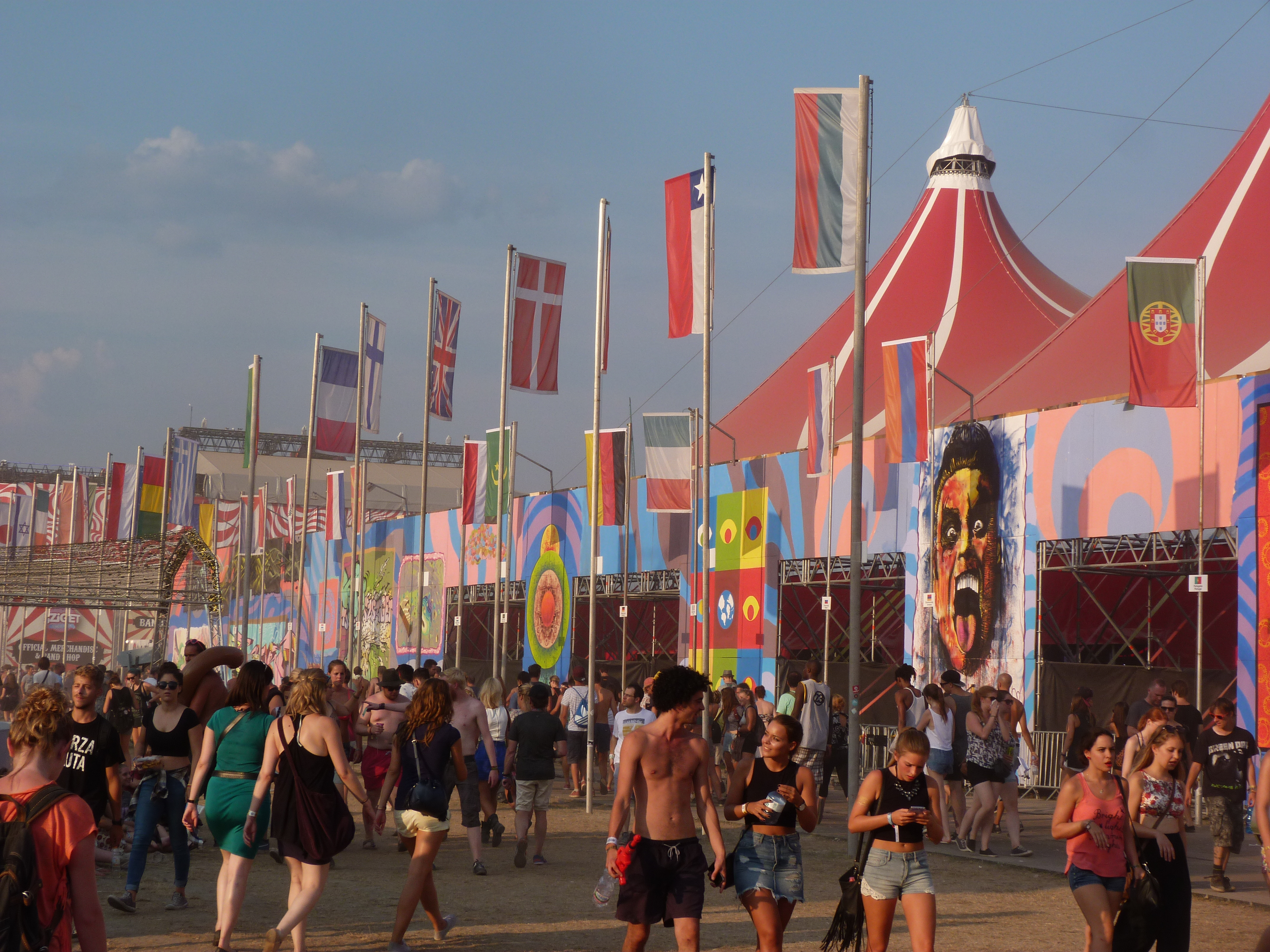 Live on the 15th of August, 2015. Sziget Festival. On Main Stage Hollywood Undead.